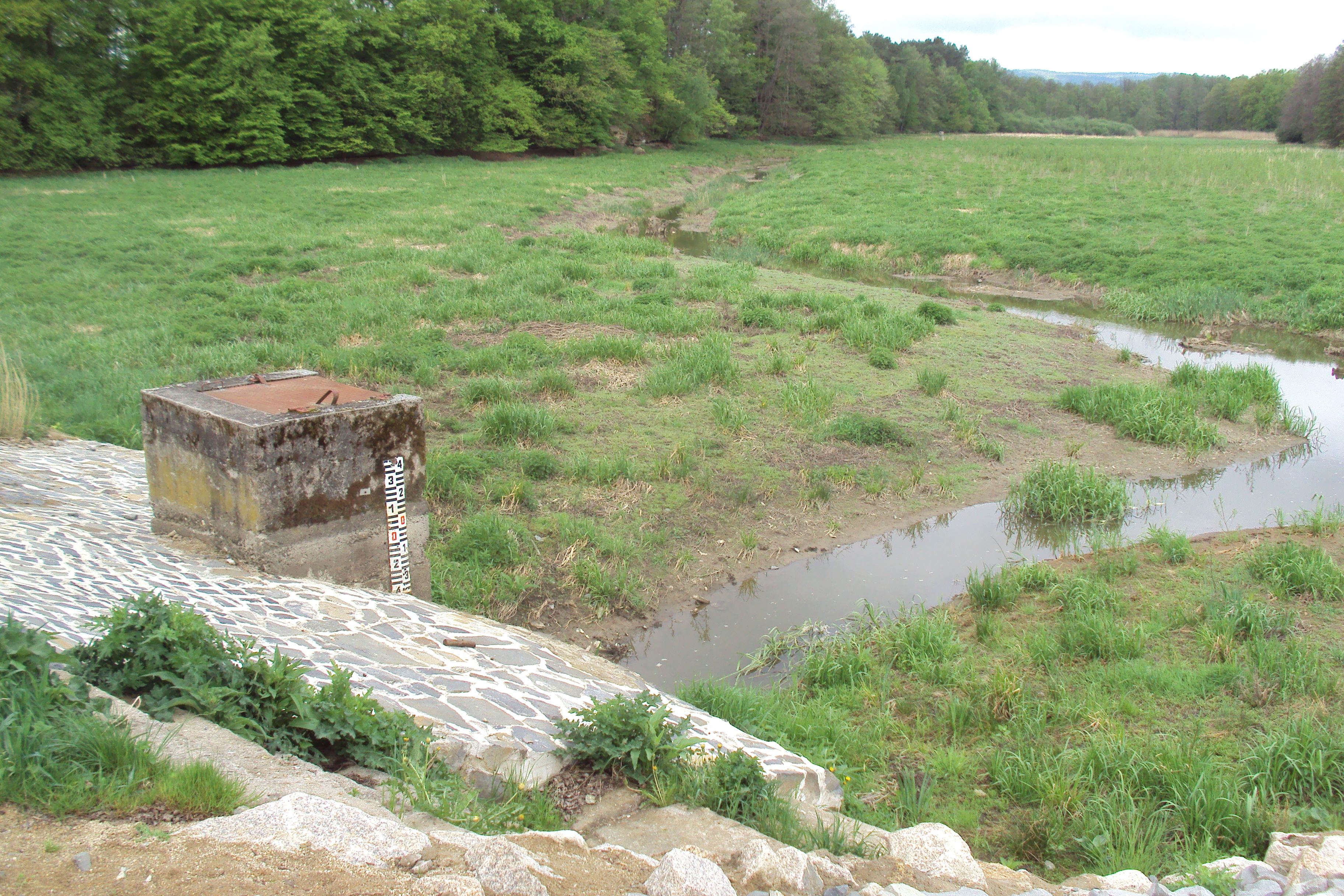 Hrázský rybník je už dlouho vypuštěný